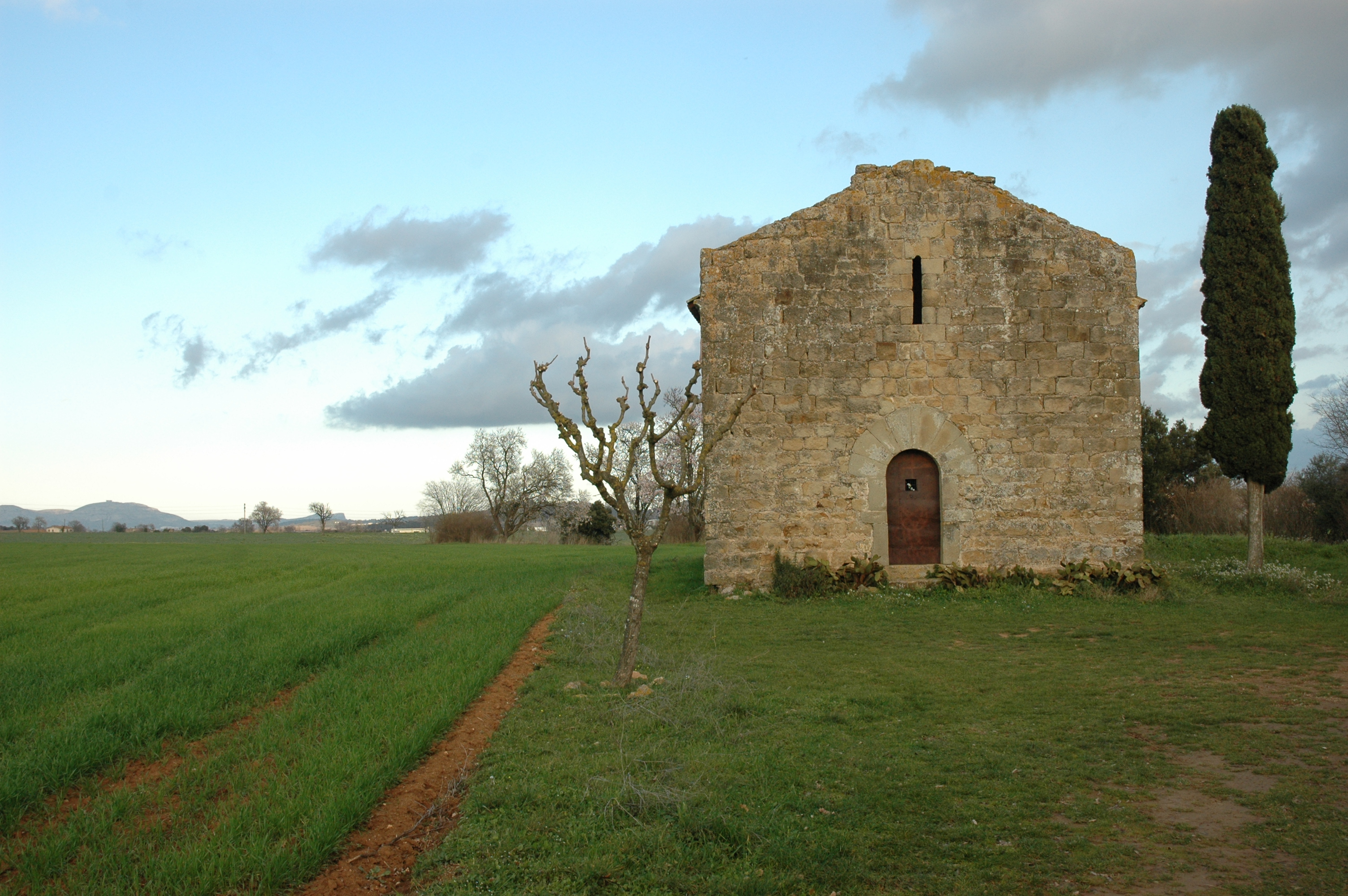 Santa Cristina de Corça - Frontis